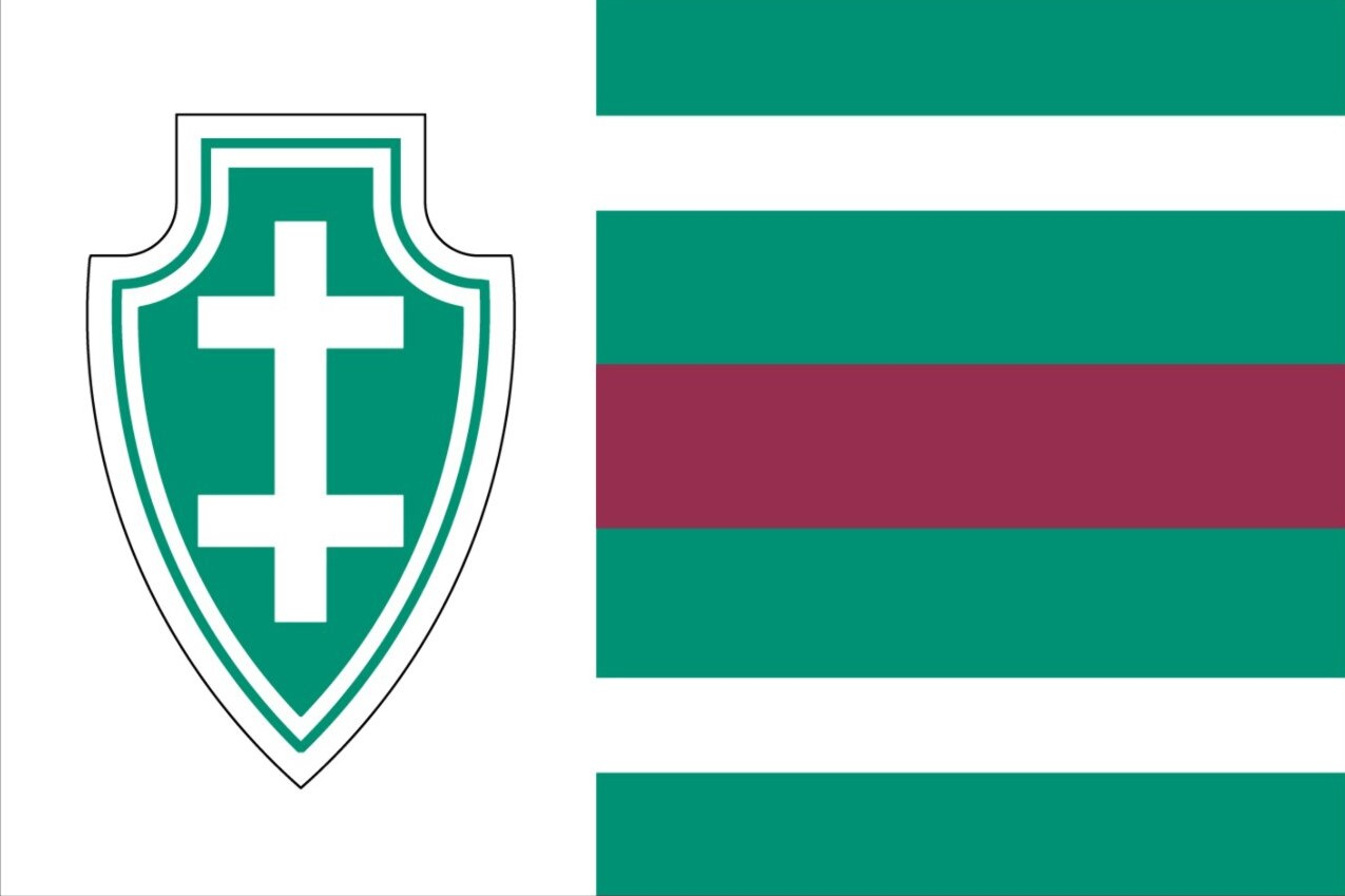 Lietuvos šaulių sąjungos vėliava